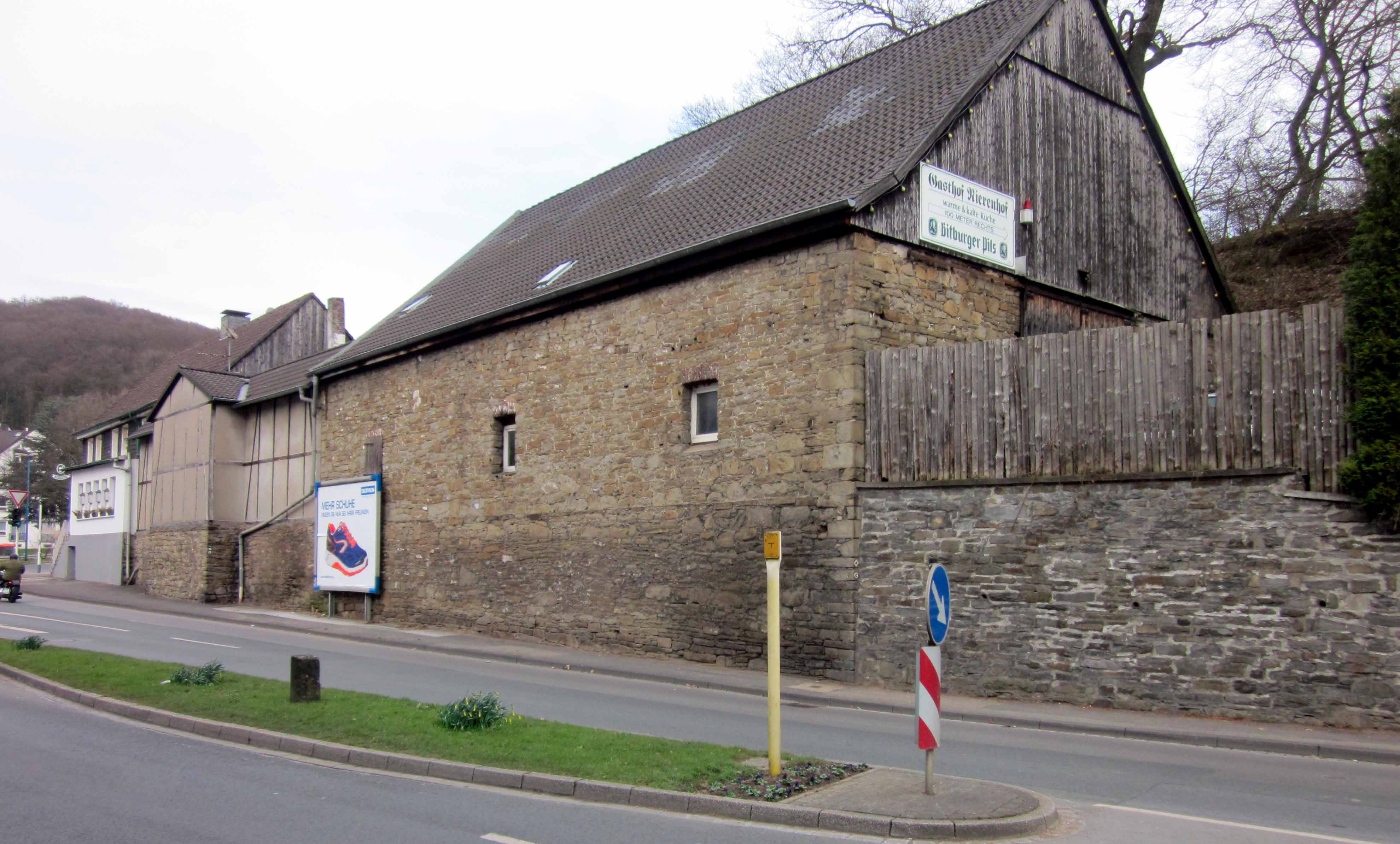 Nebengebäude Gasthof Nierenhof auf mächtigem Bruchsteinsockel 2013